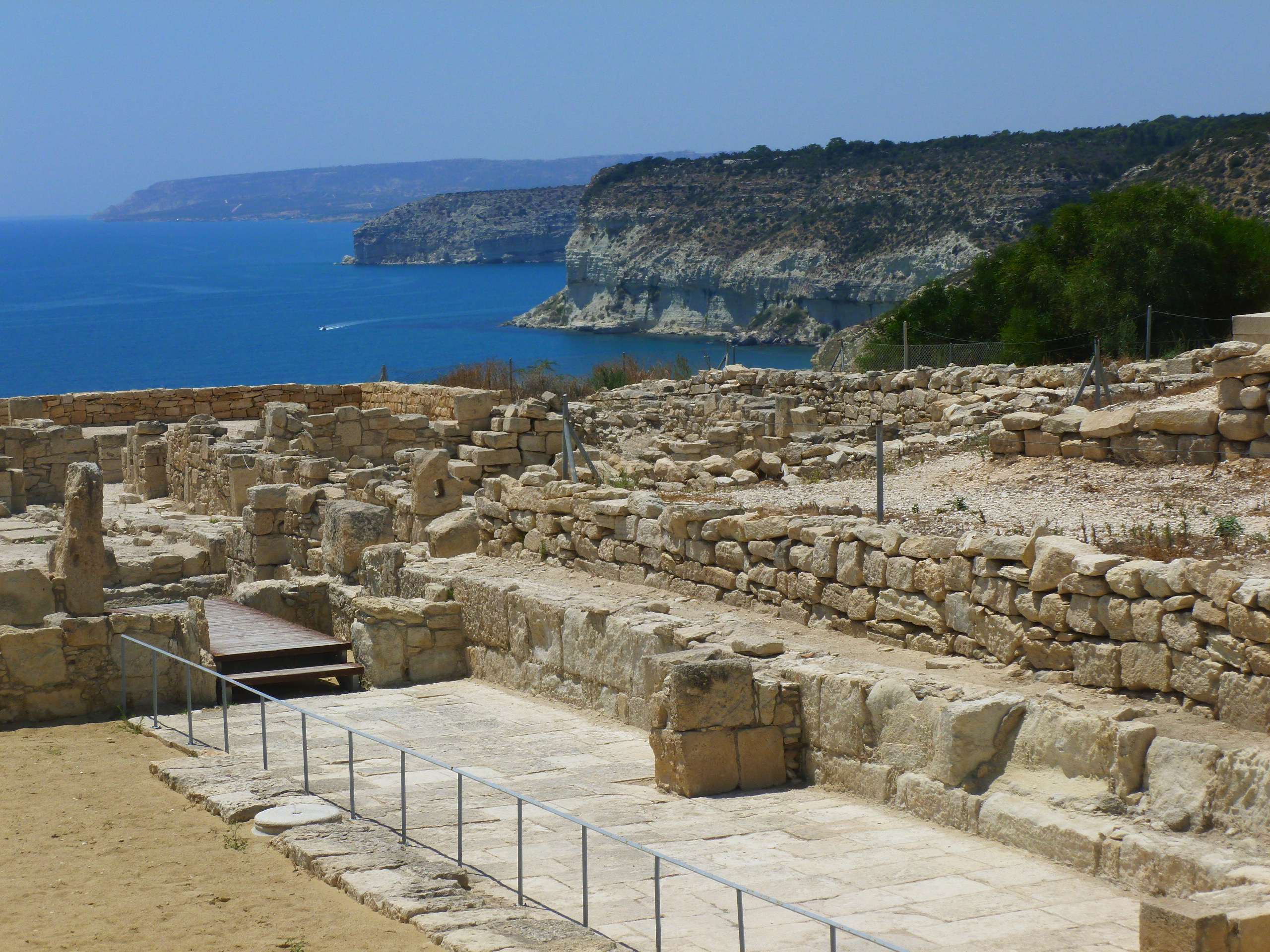 Ancient Kourion, Episkopi, Cyprus